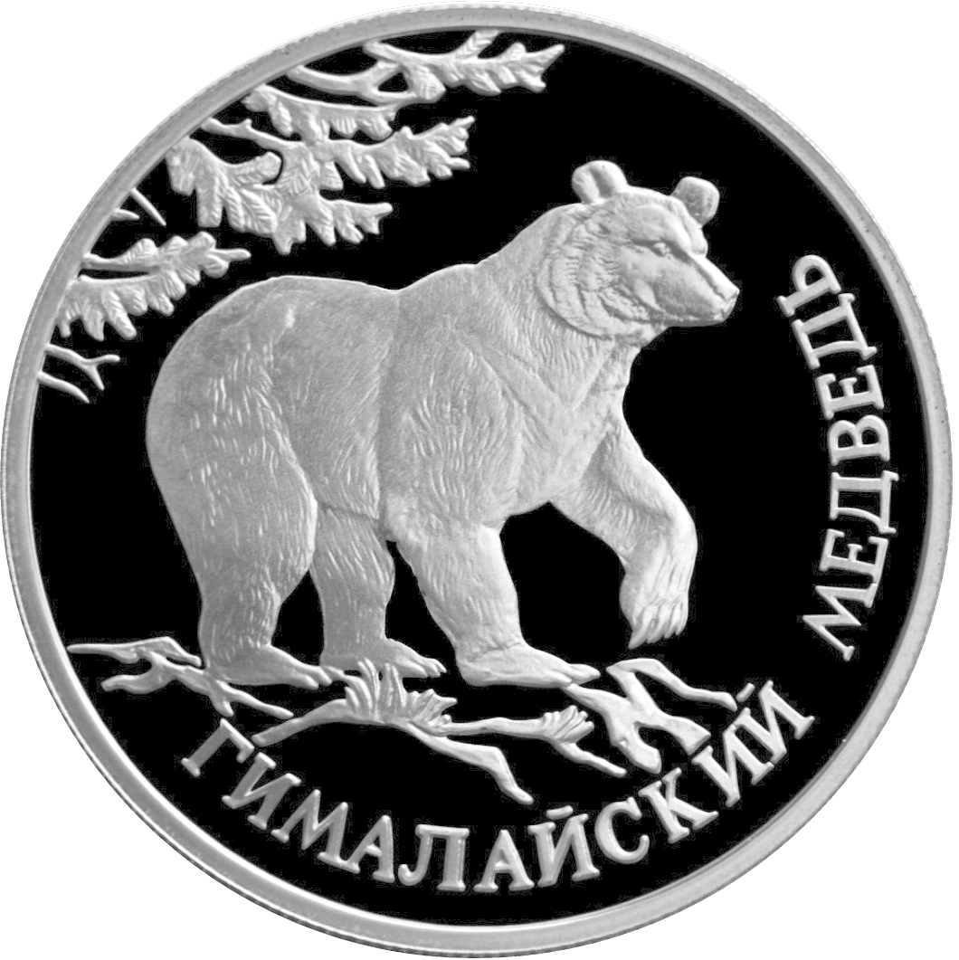 Серия: «Красная книга», Гималайский медведь, 1 рубль, реверс.